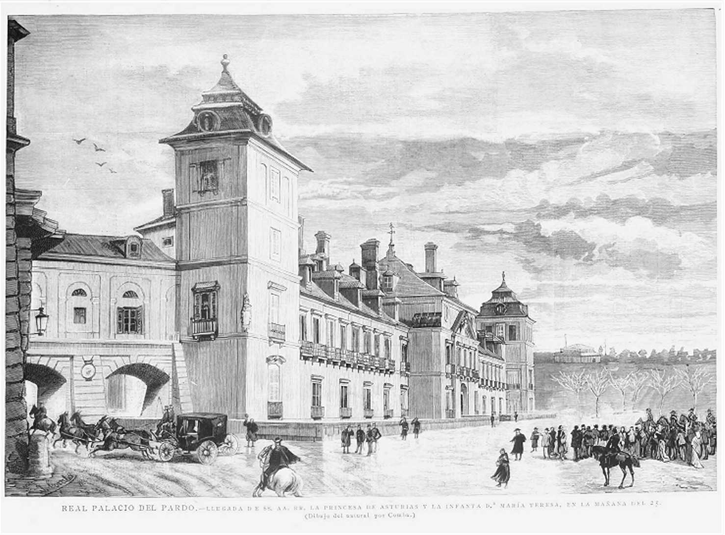 Real Palacio del Pardo arrivo delle SS.MM. la Principessa delle Asturie e la Infanta D.a Maria Teresa il mattino del 25 [novembre 1885]